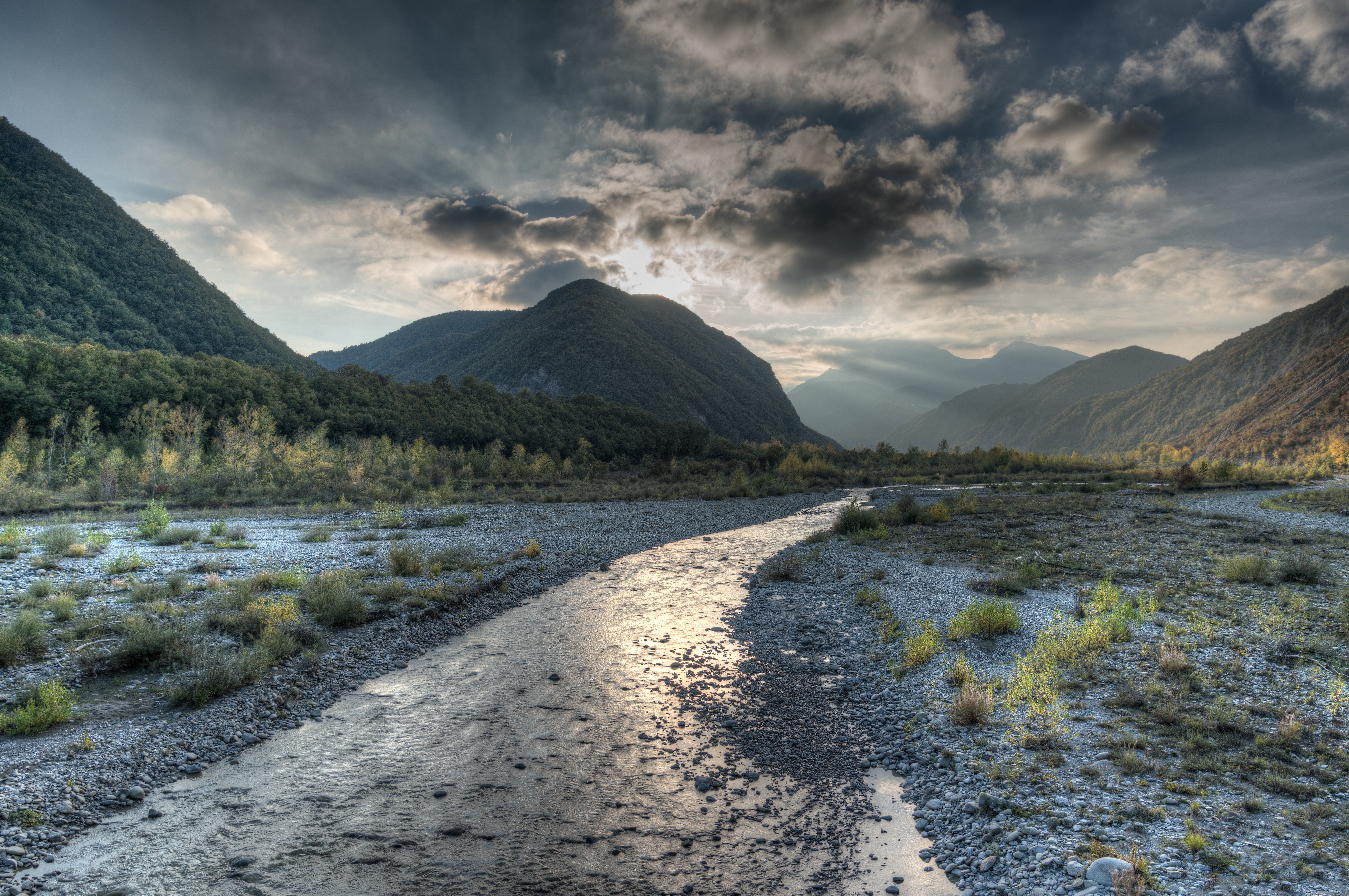 Fiume Secchia - Castelnovo ne' Monti, Reggio Emilia, Italia